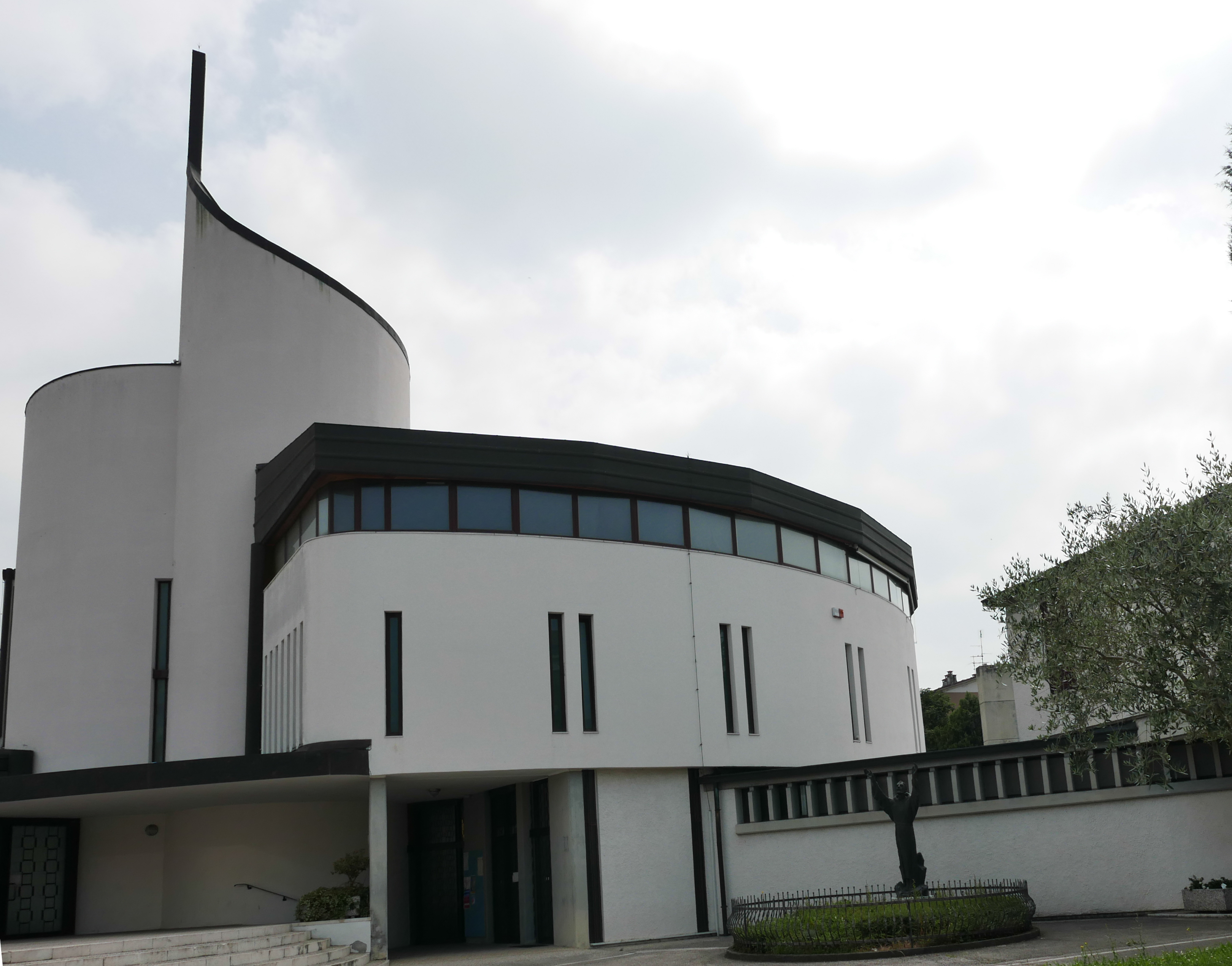 Chiesa di San Francesco